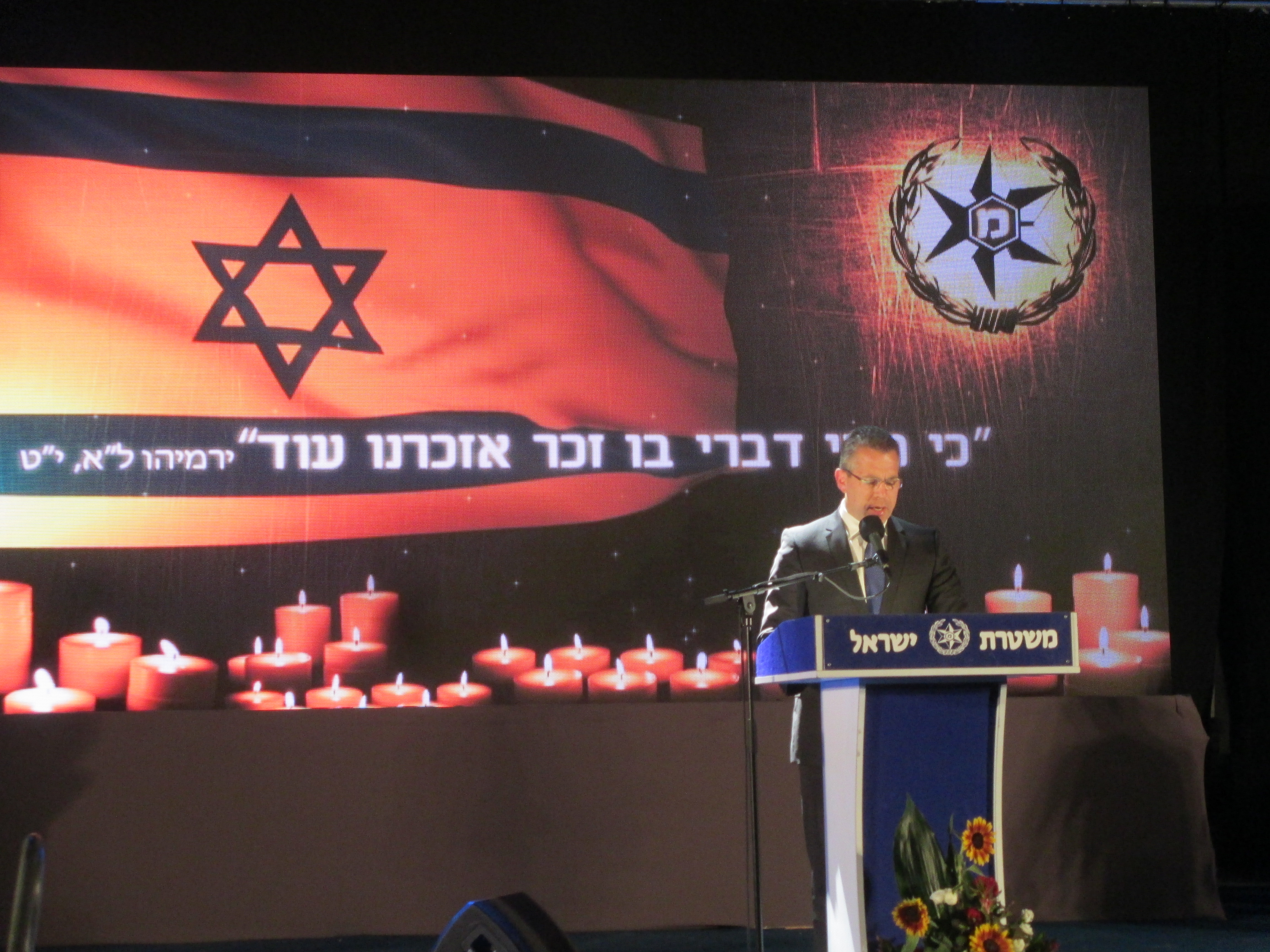 השר גלעד ארדן בטקס אזכרה לחללי משטרת ישראל במכללה הלאומית לשוטרים בבית שמש